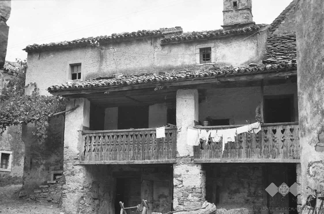 Špelna hiša, Lozice.